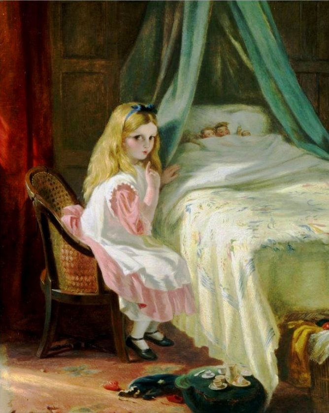 Sshh